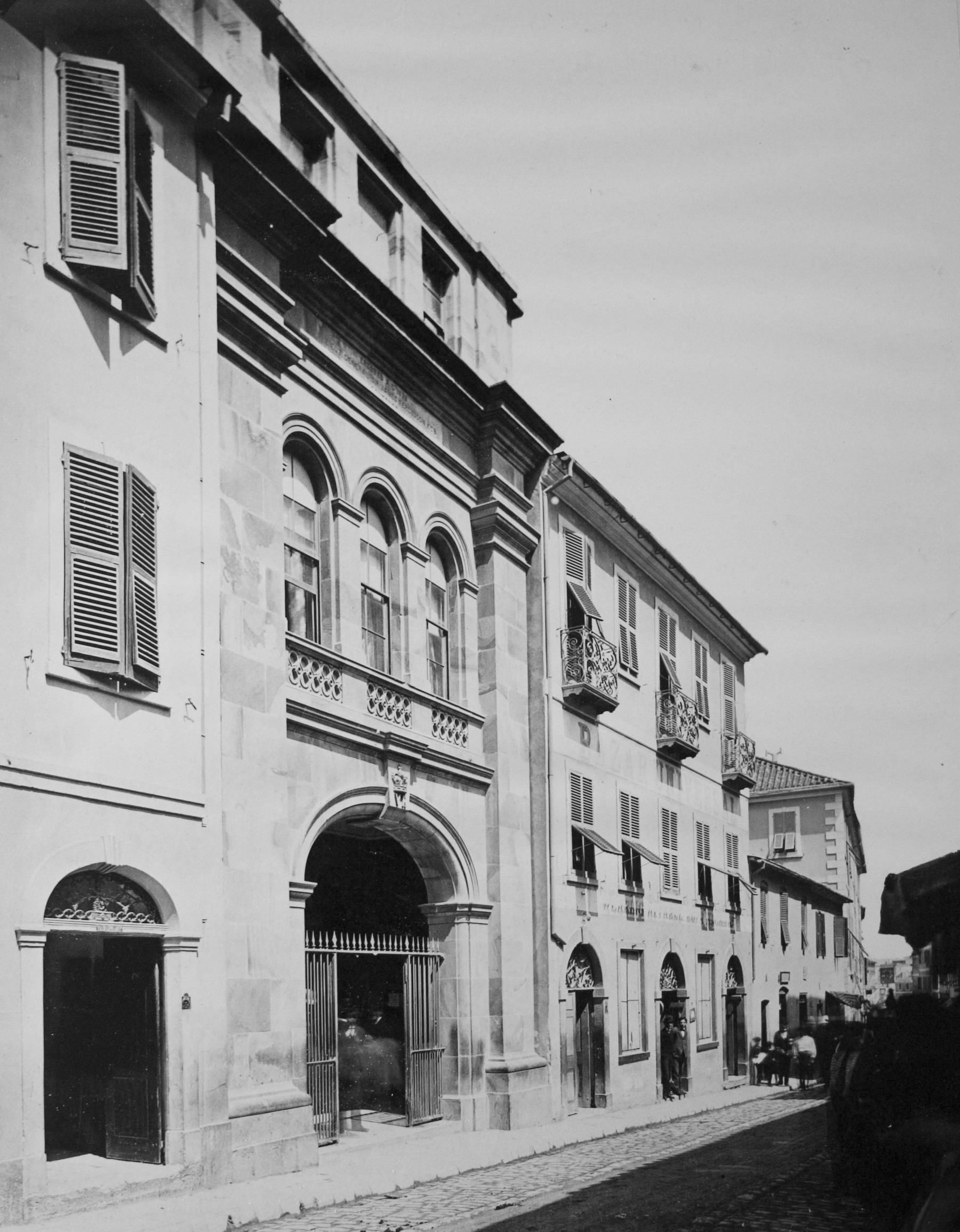 Post Office, Gibraltar